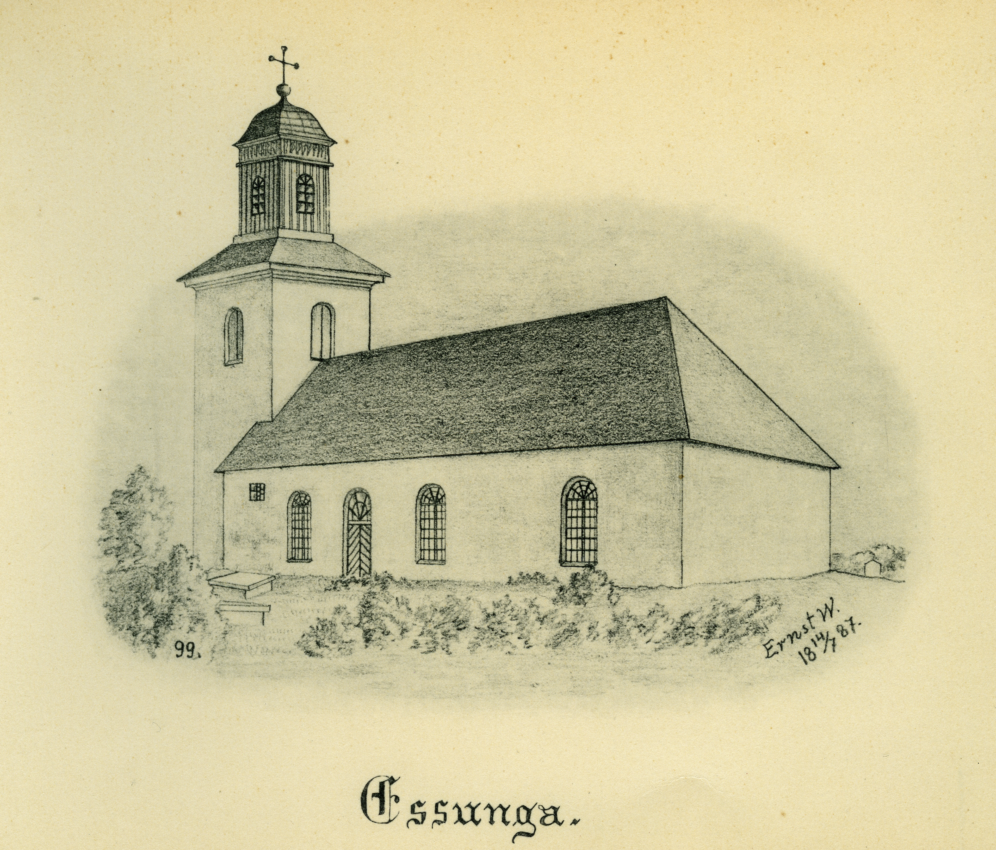 Essunga kyrka år 1887 i Barne härad, Skara stift, Västergötland, Sverige. Teckning av Ernst Wennerblad ur Skara stifts kyrkor (1902).